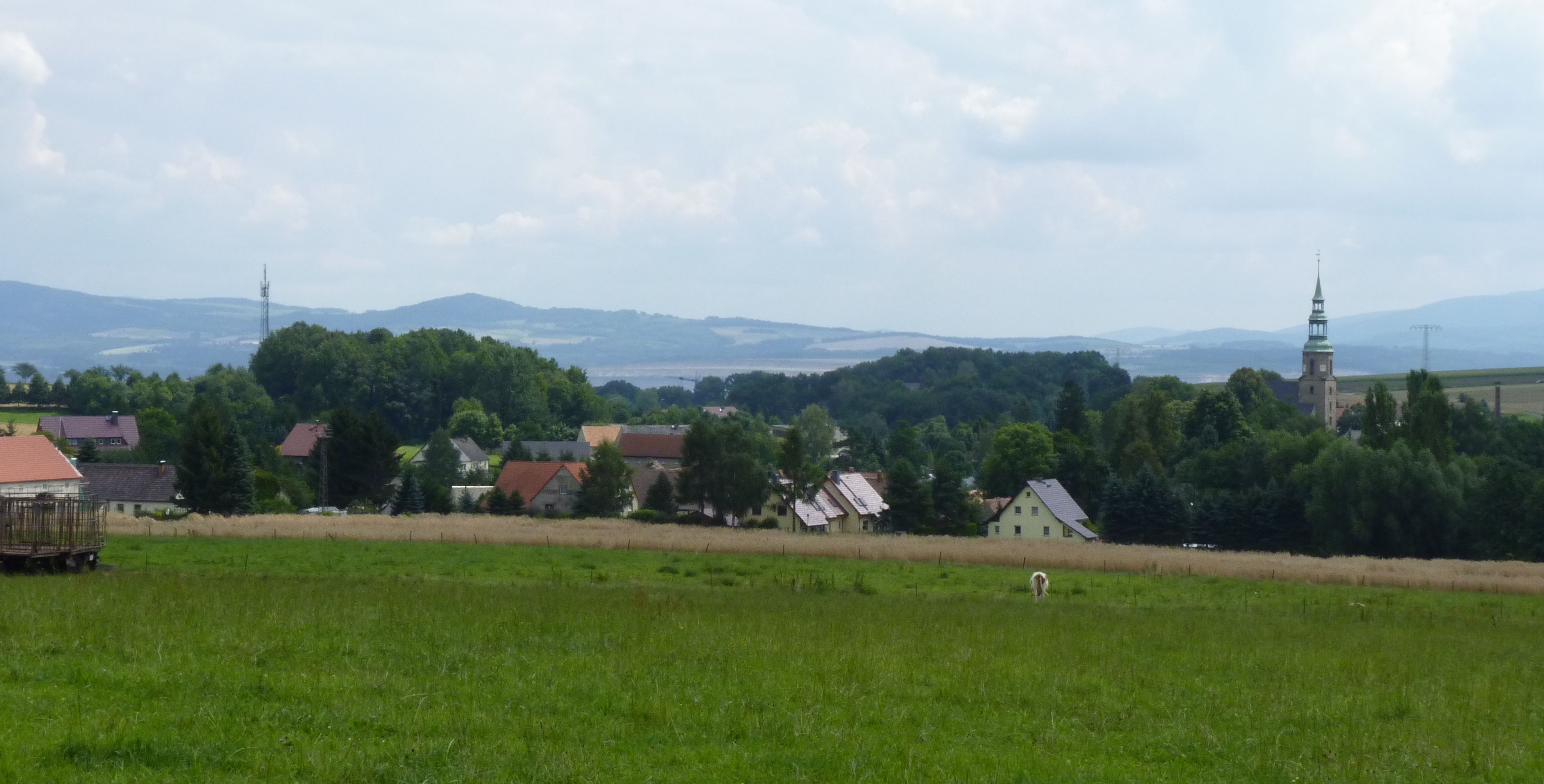 Der Zittauer Stadtteil Wittgendorf.